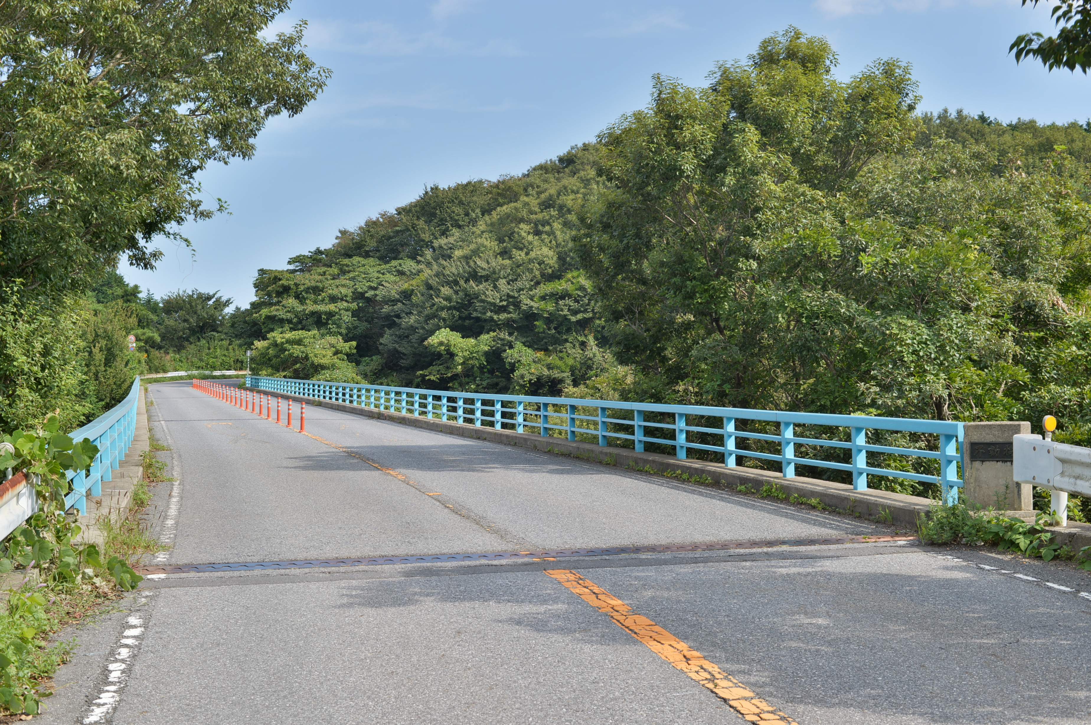 不動橋（茨城県道236号筑波公園永井線）